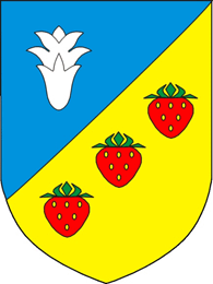 Herb miasteczka Dworzec